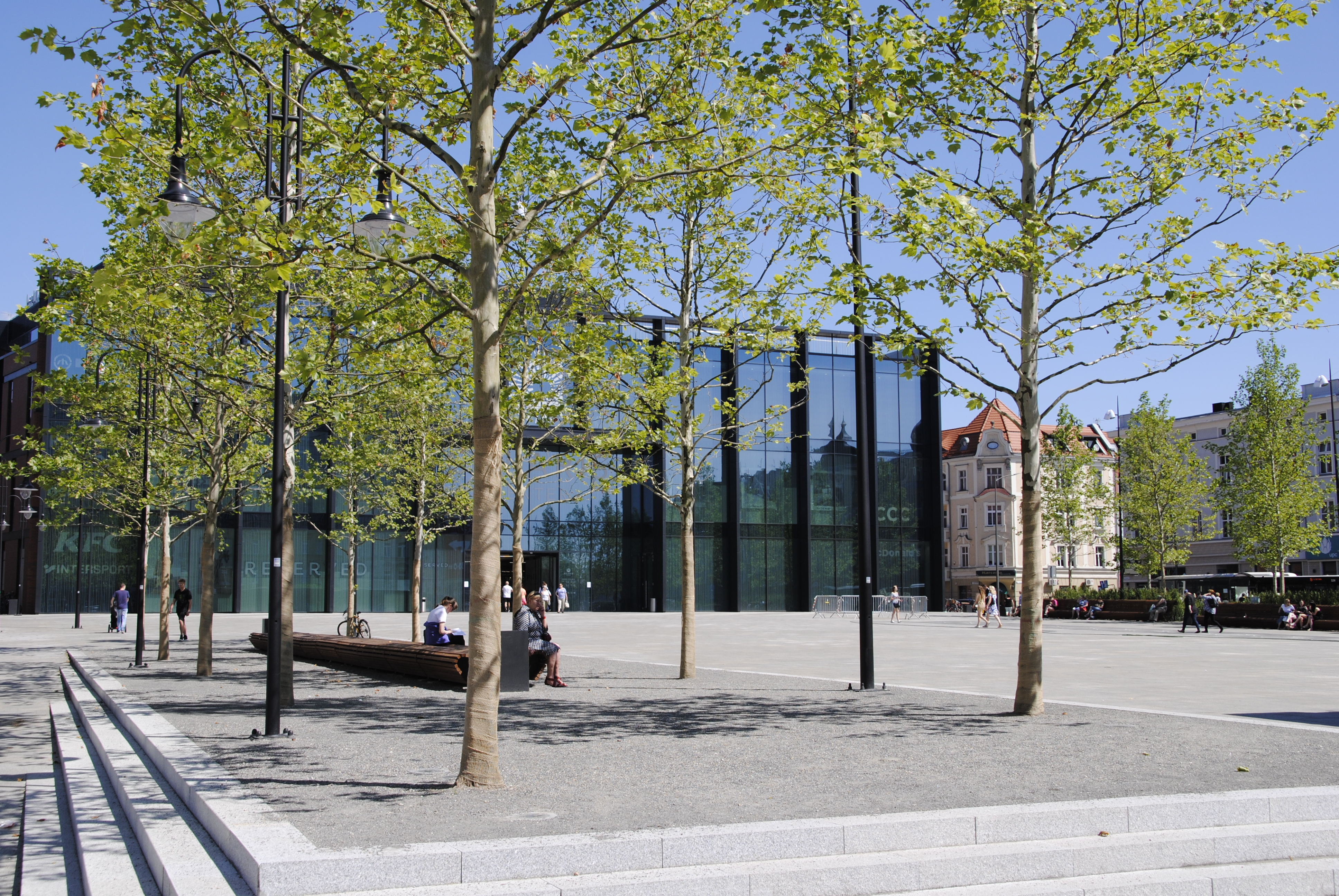 Plac Kopernika in Oppeln Oberschlesien mit 2019 eröffneten Neuanbau des Solaris Center